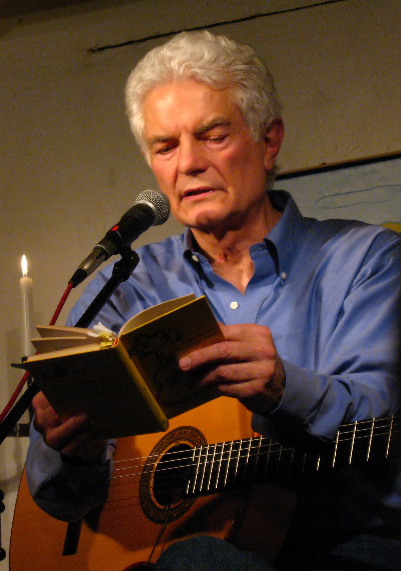 Peter Horton, Kloster Irsee, 2008, Sänger, Liederschreiber, Poet